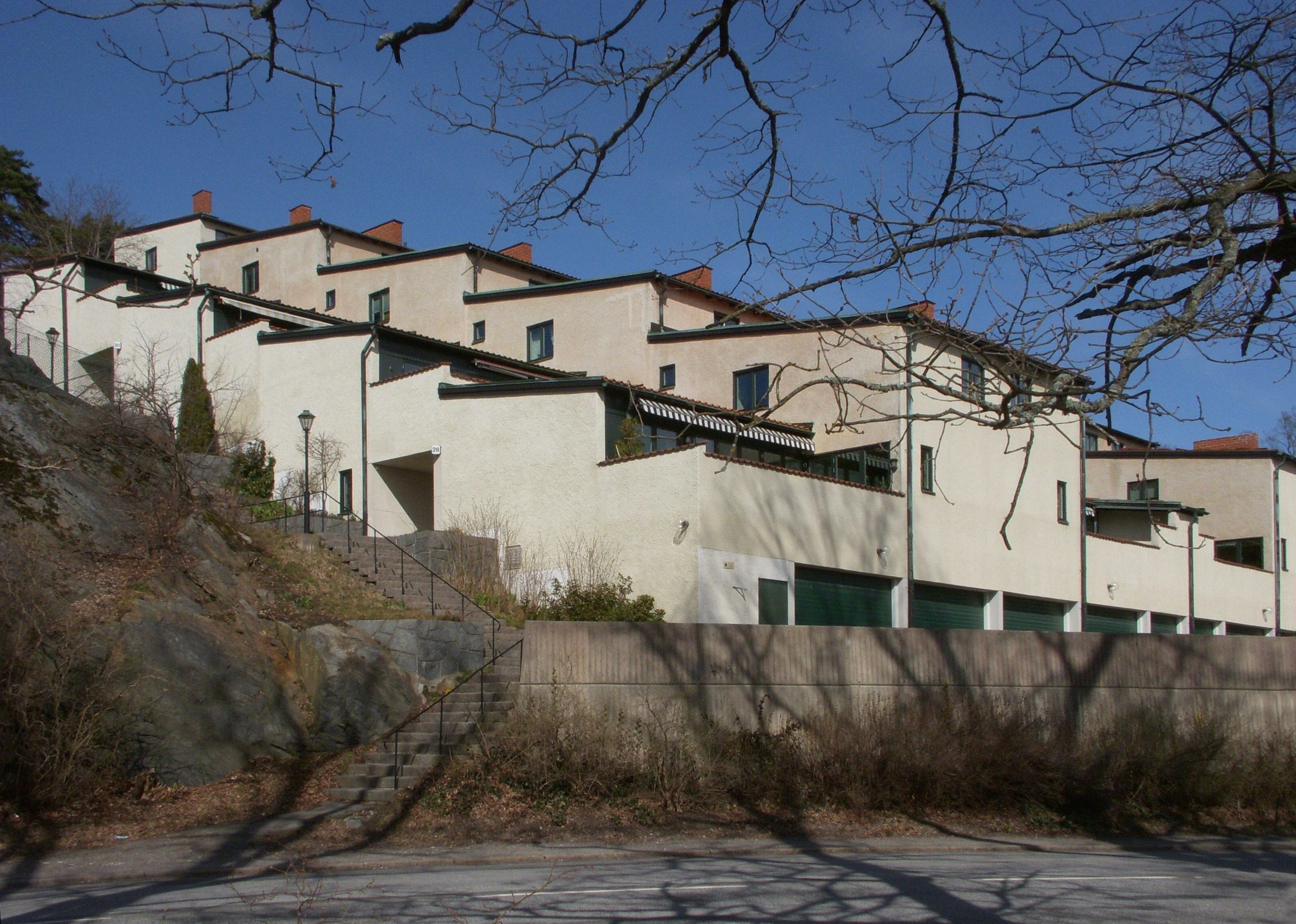 Terrasshusbebyggelse vid Dalbobranten